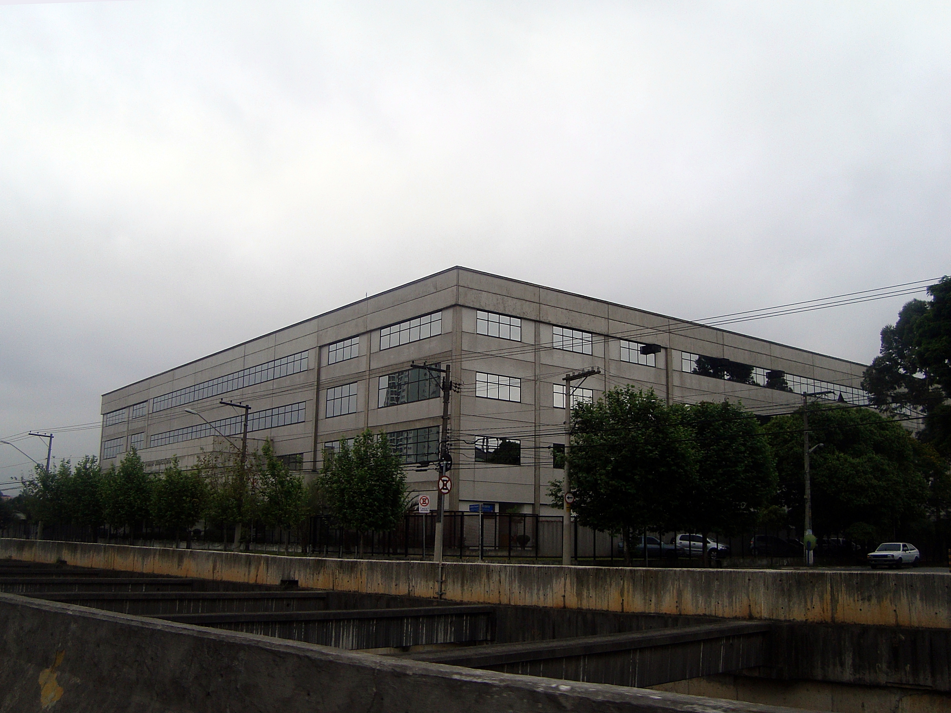 Foto do Fórum Regional de Santana, localizado no distrito da Casa Verde, zona norte de São pAULO.